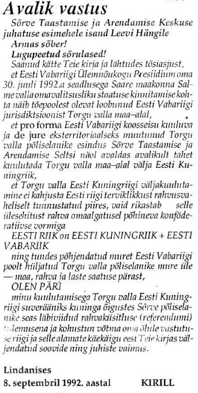 Kirill Teiteri vastus Leevi Hängi avalikule kirjale